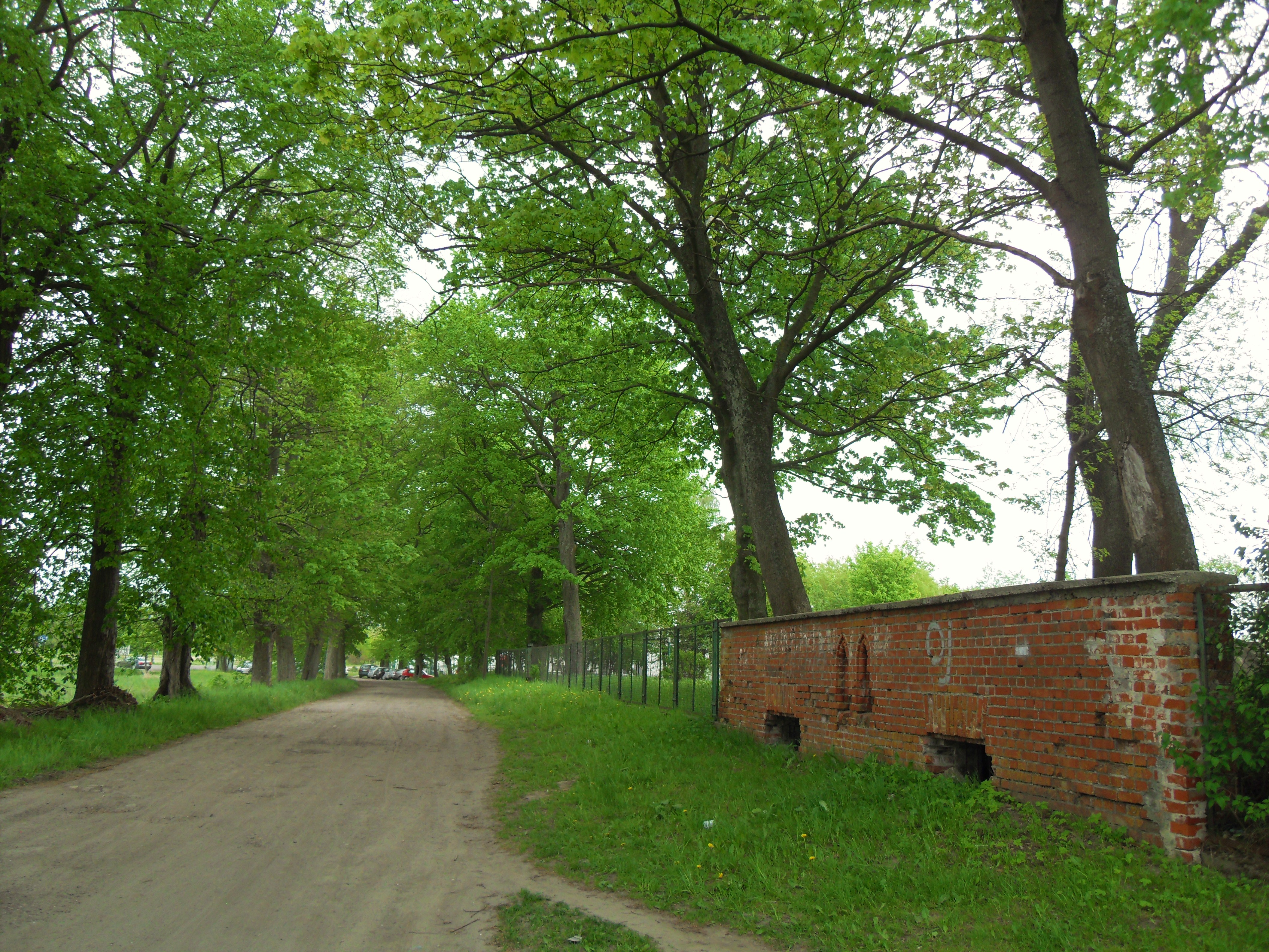 Gdańsk Bysewo, pozostałości dworu.